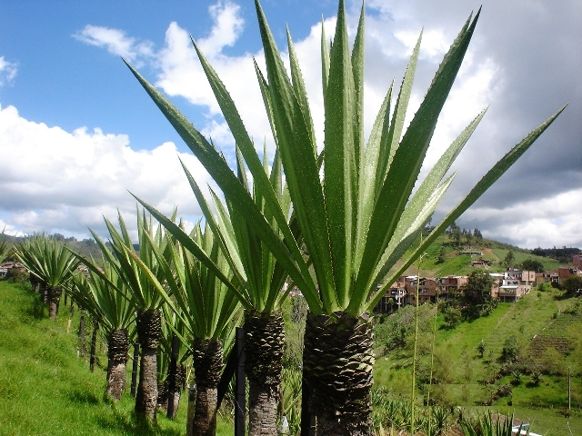 Planta de fique